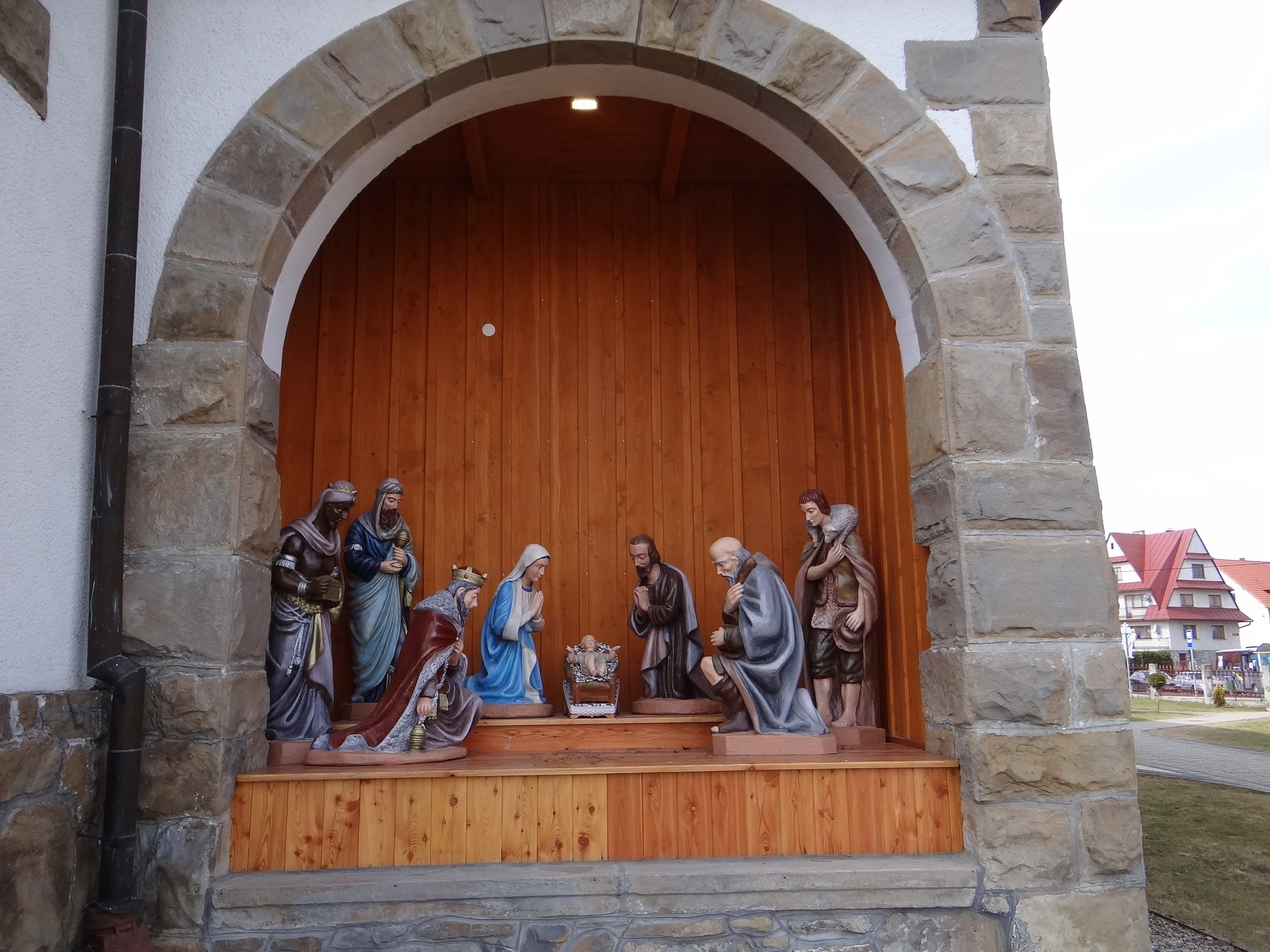 Kościół w Cichem. Parafia Miętustwo